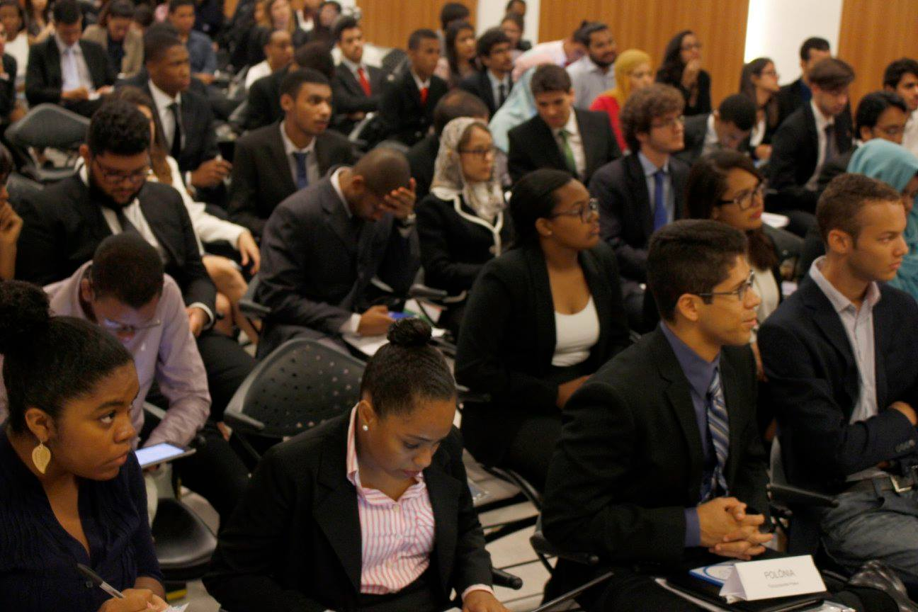 Alunos do Bacharelado em Relações Internacionais no SINU - Simulado das Nações Unidas.